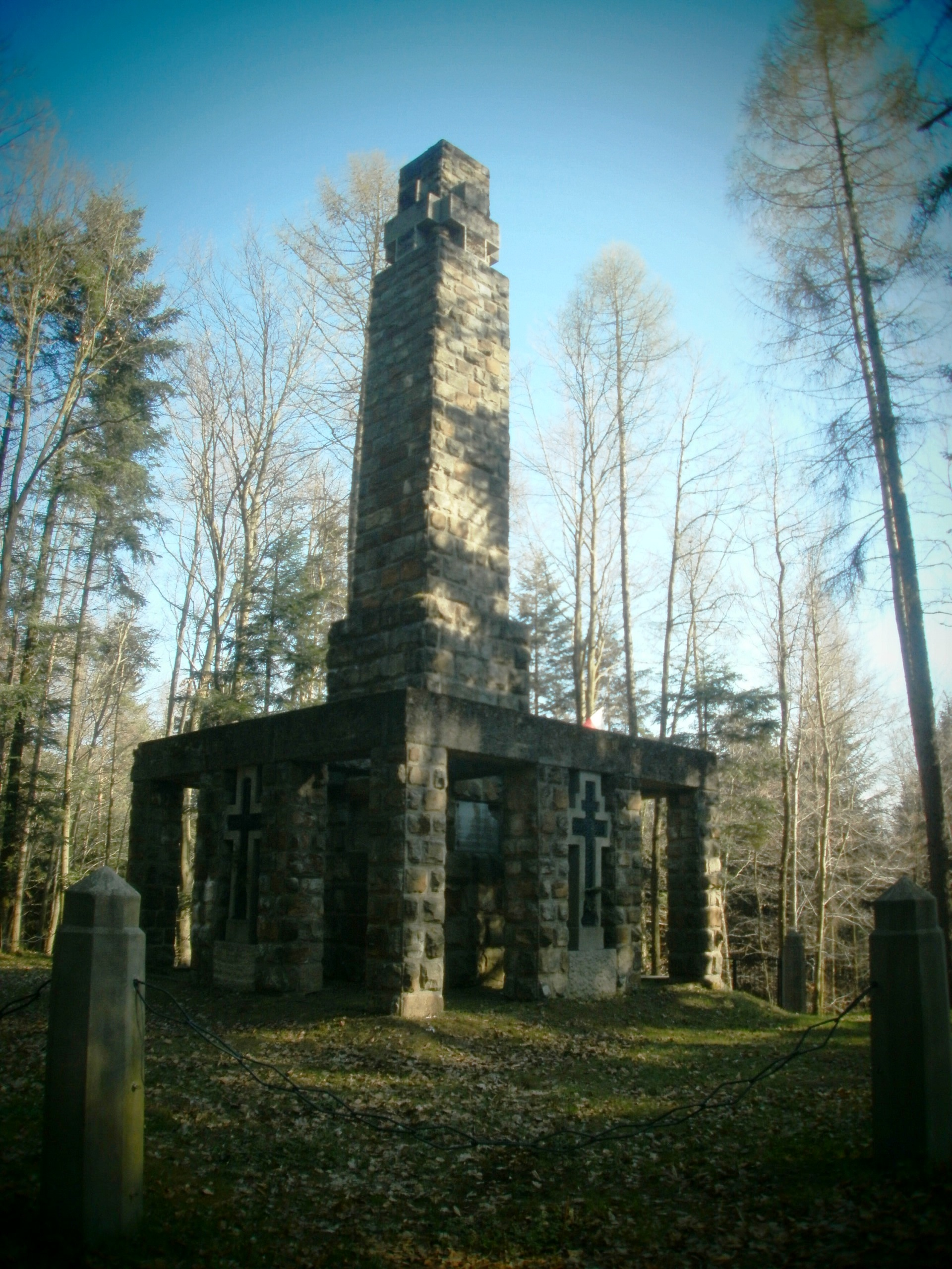 Charzewice, cmentarz wojenny nr 290 z I wojny światowej, 1916-1917